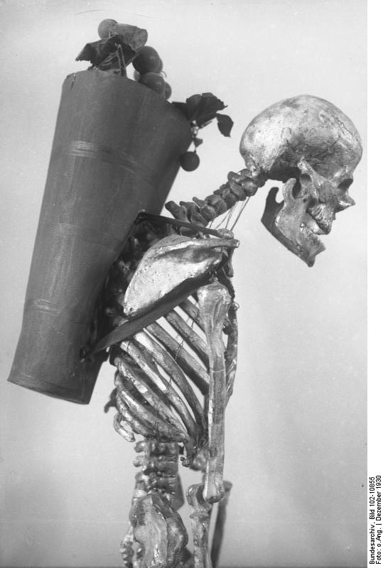 Das eigenartigste Museum der Stadt Berlin! Die Darstellung von Berufskrankheiten. An Hand dieses Skelettes kann man beobachten, dass durch das jahrelange Tragen von Lasten auf dem Rücken eine akute Rückgratverkrümmung eintritt.